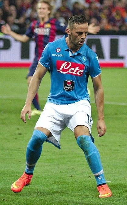 Giandomenico Mesto con la maglia del Napoli